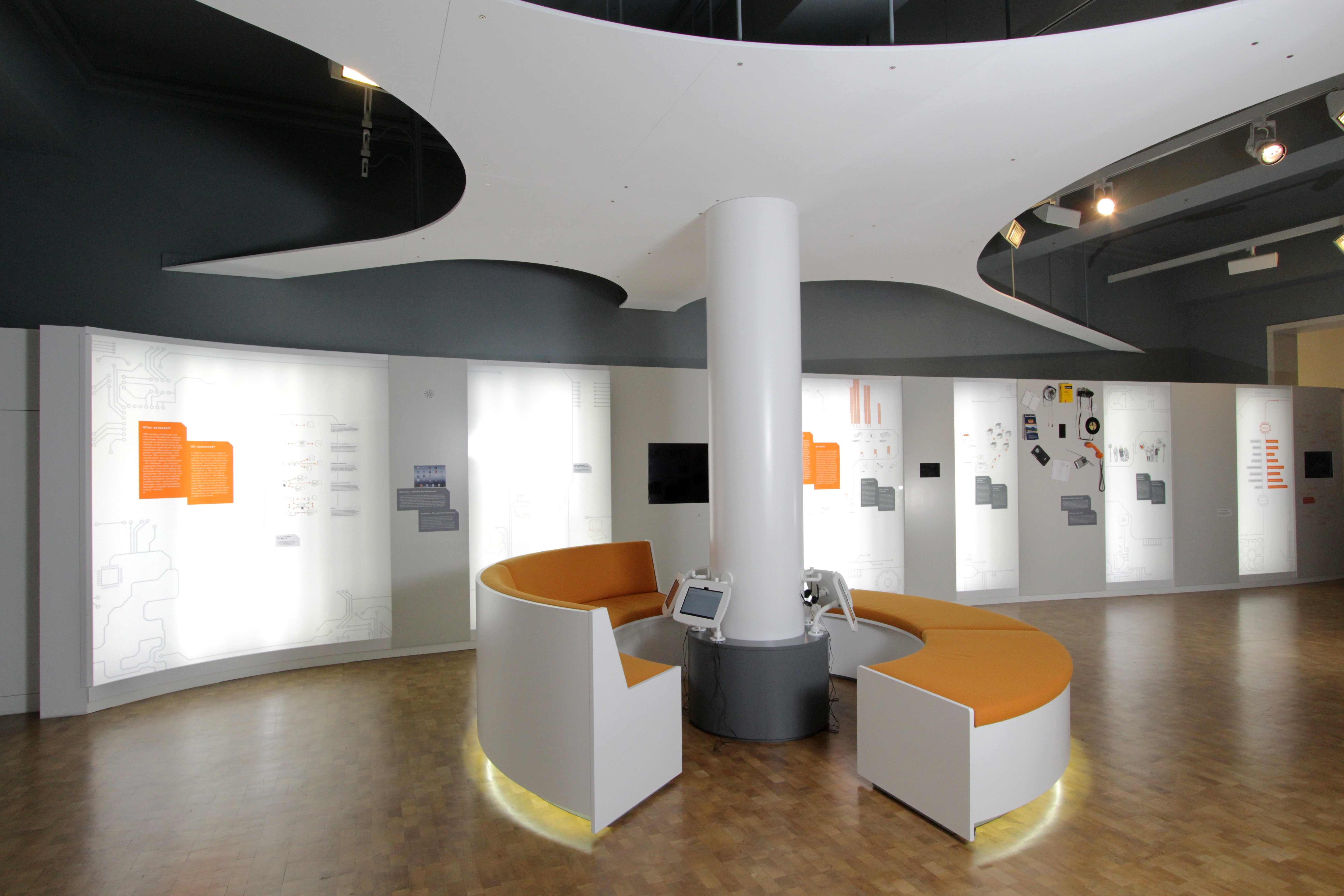 Museum für Kommunikation Nürnberg, Raum 4 – Netzwelten